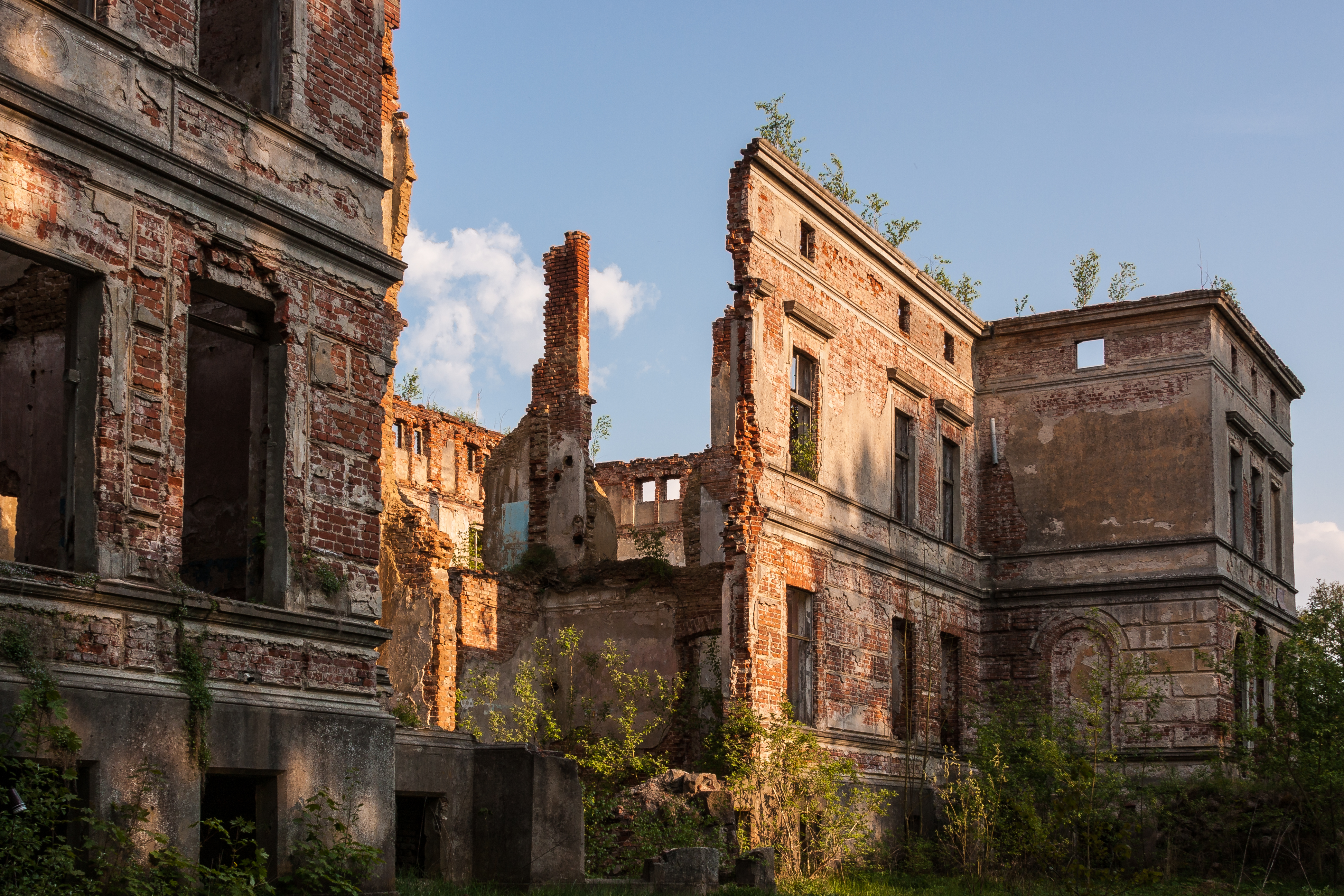 Wicimice - pałac, 3 ćw. XIX